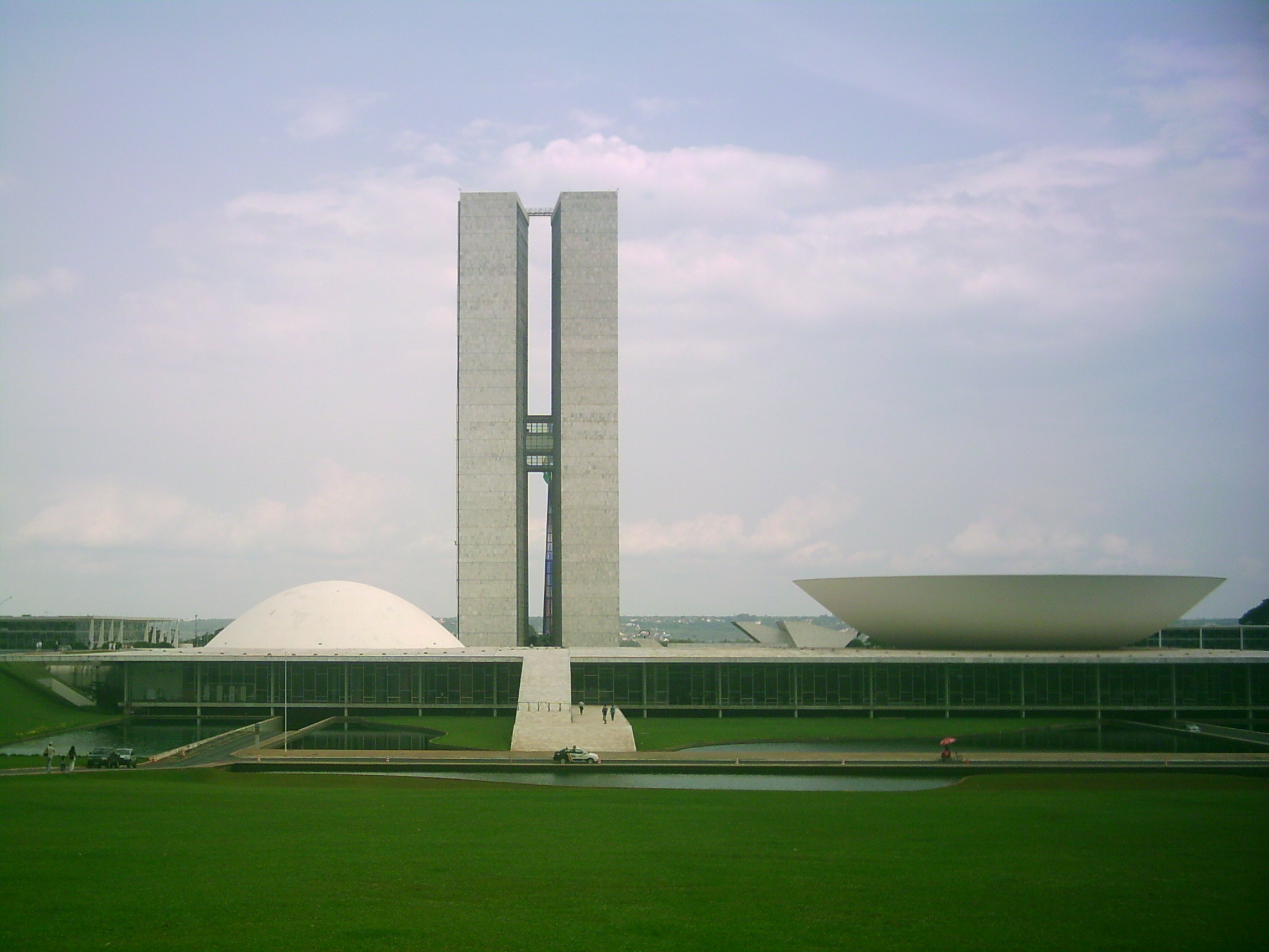 Congresso Nacional do Brasil